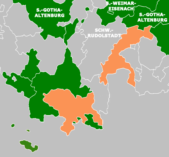 Saksen-Coburg-Saalfeld in 1820